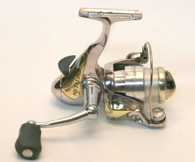 Haspelsnelle